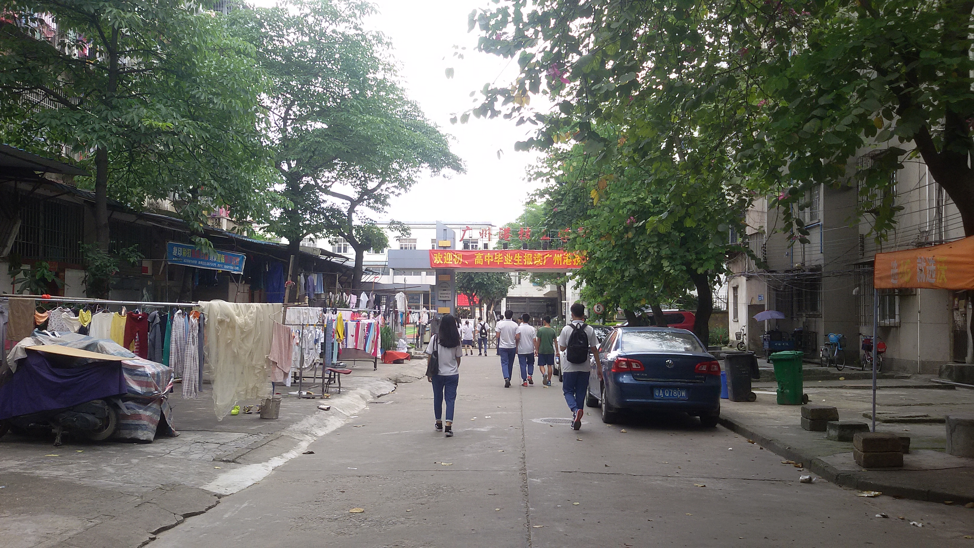 粵語: 廣州港技工學校正門